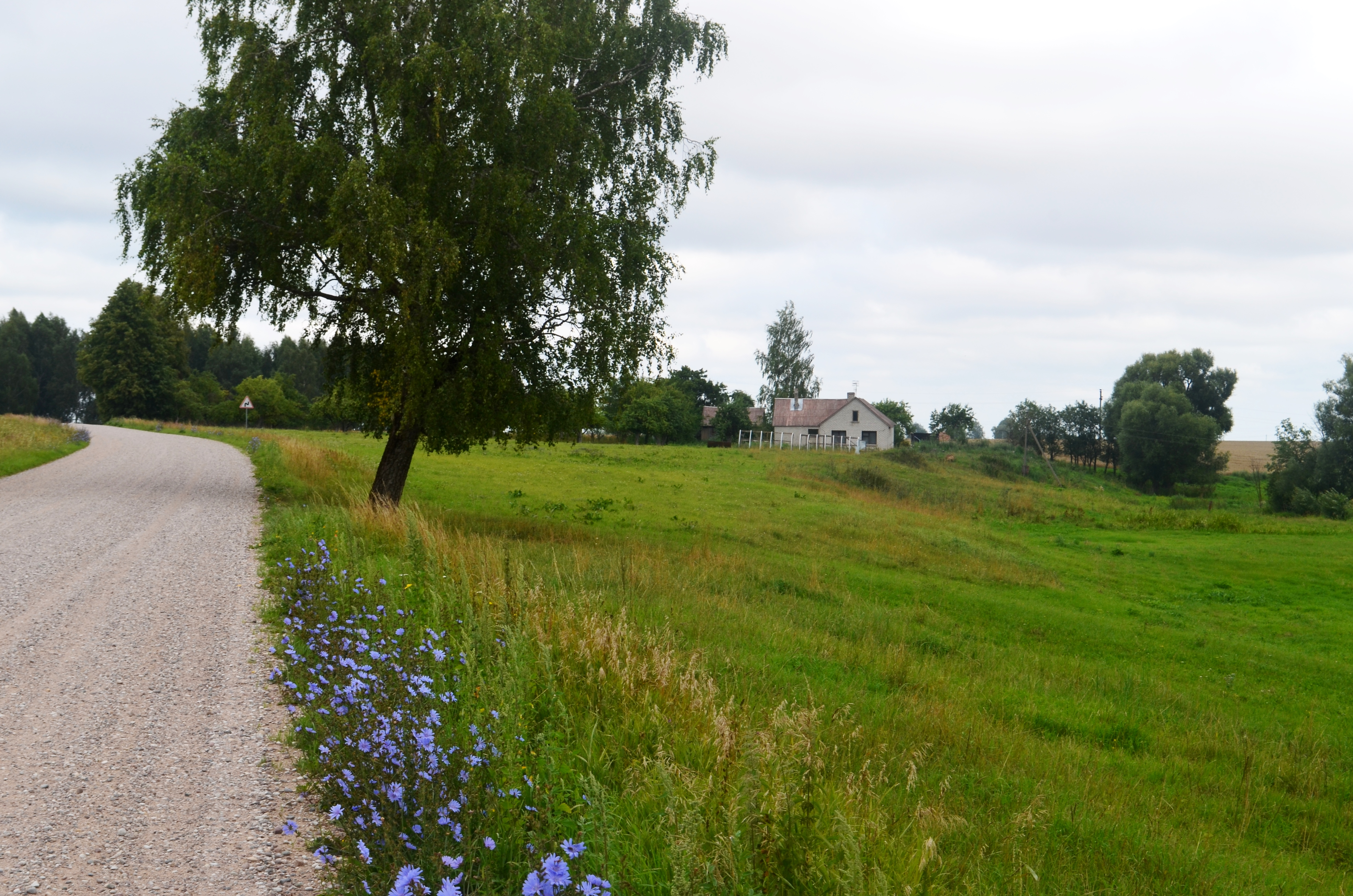 Martyniškis, Jonavos raj.